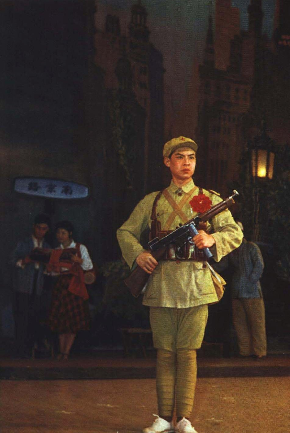 1964-04 1964年 话剧 霓虹灯下的哨兵